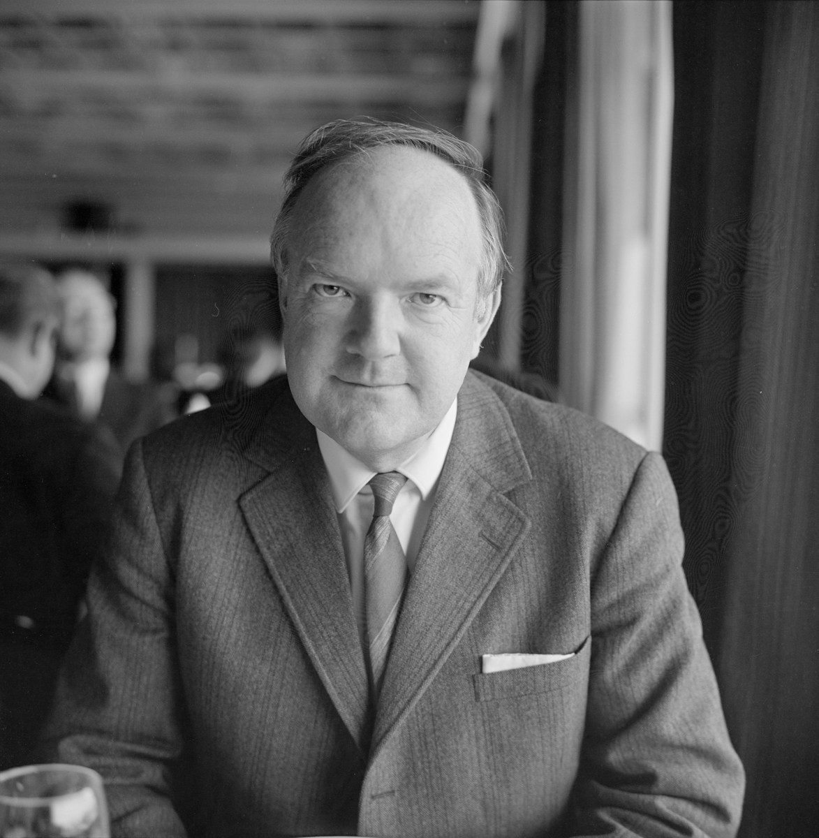 Psykiater Nils Retterstøl, 1971